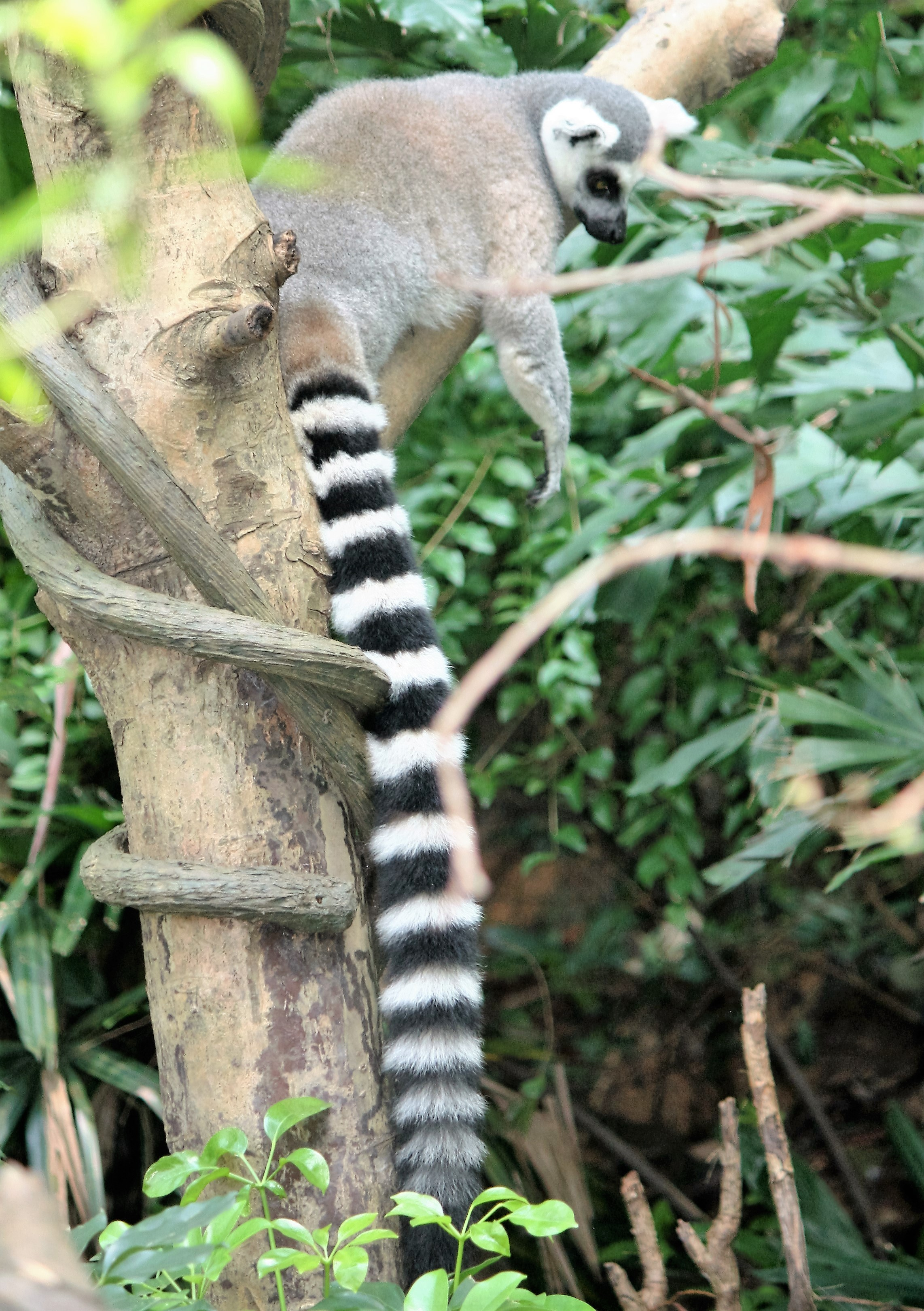 Zoo Guangzhou